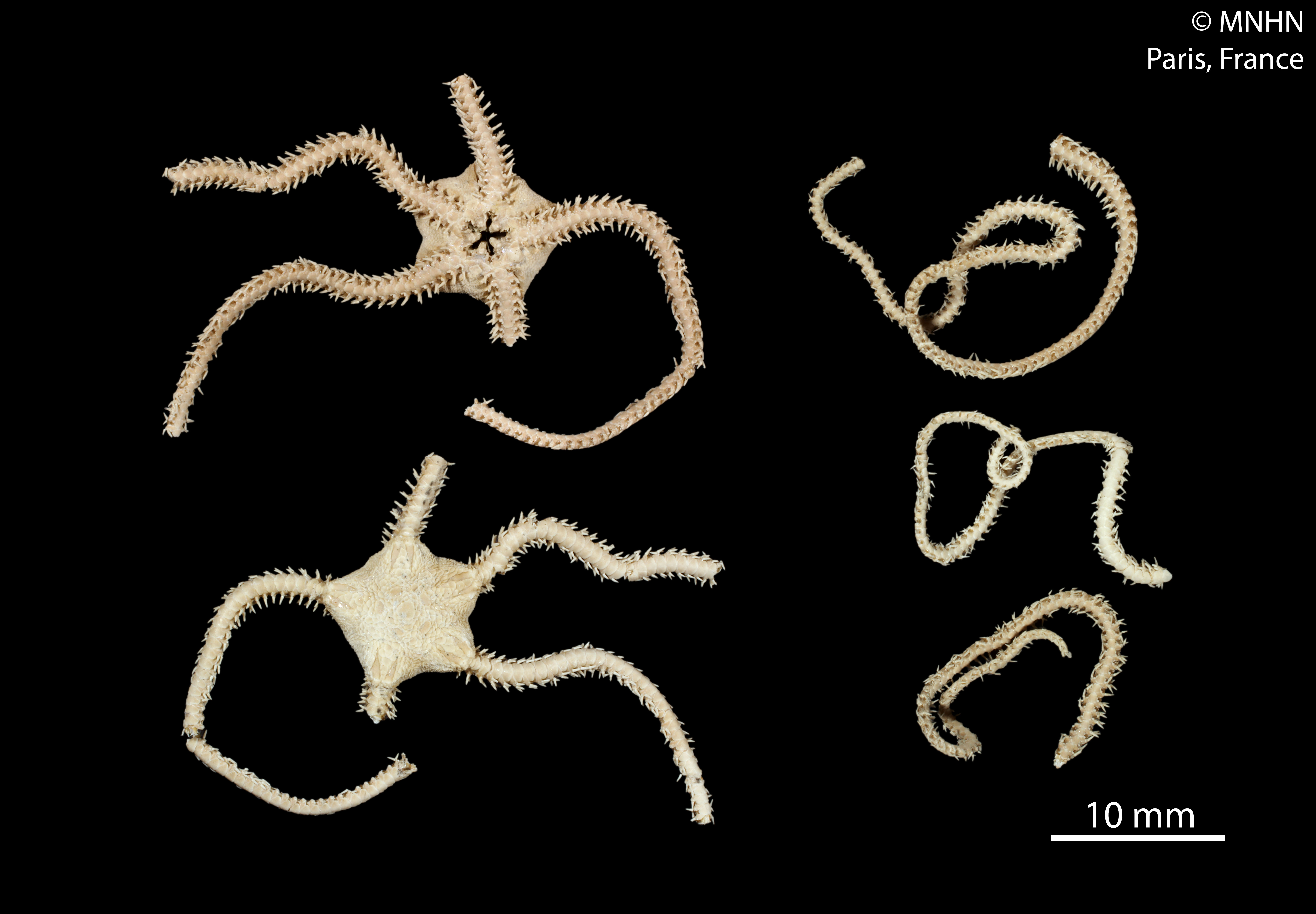 Amphioplus peregrinatorSpécimen MNHN-IE-2013-10196, sous la dénomination Amphiura peregrinator Koehler, 1912Collection : Échinodermes (IE)Muséum National d'Histoire Naturelle (Paris, France) Origine : Libellé du pays : ANTARCTIQUE Localité/Lieu-dit : Chenal de Roosen Localité originale : devant Port Lockroy Nom du collecteur : Charcot J. Expédition : Exp. Charcot : Exp. ant. fr. 1908-1910 Navire : Pourquoi Pas? IV Type : Navire polaire Numéro de station : D15 Profondeur (mètres) : 70